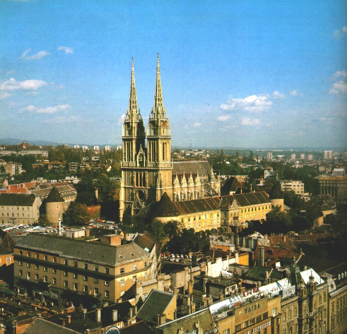 Zagreb vu d'en haut.